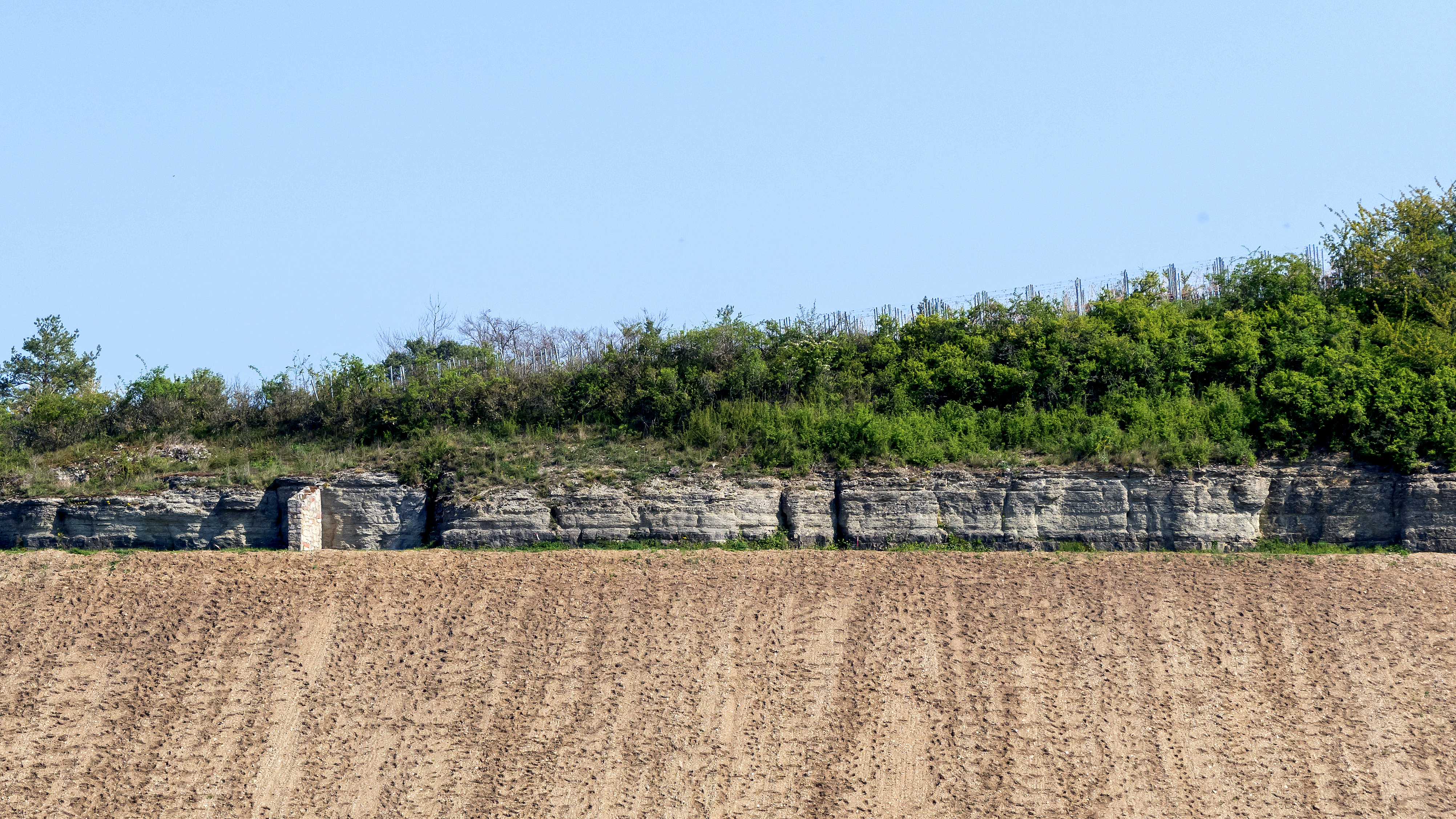 Geotope im Landkreis Würzburg Felshänge am Hirschberg ENE von Erlabrunn Geotop-Nummer 679R003 Aufschluß an den Weinbergen 1